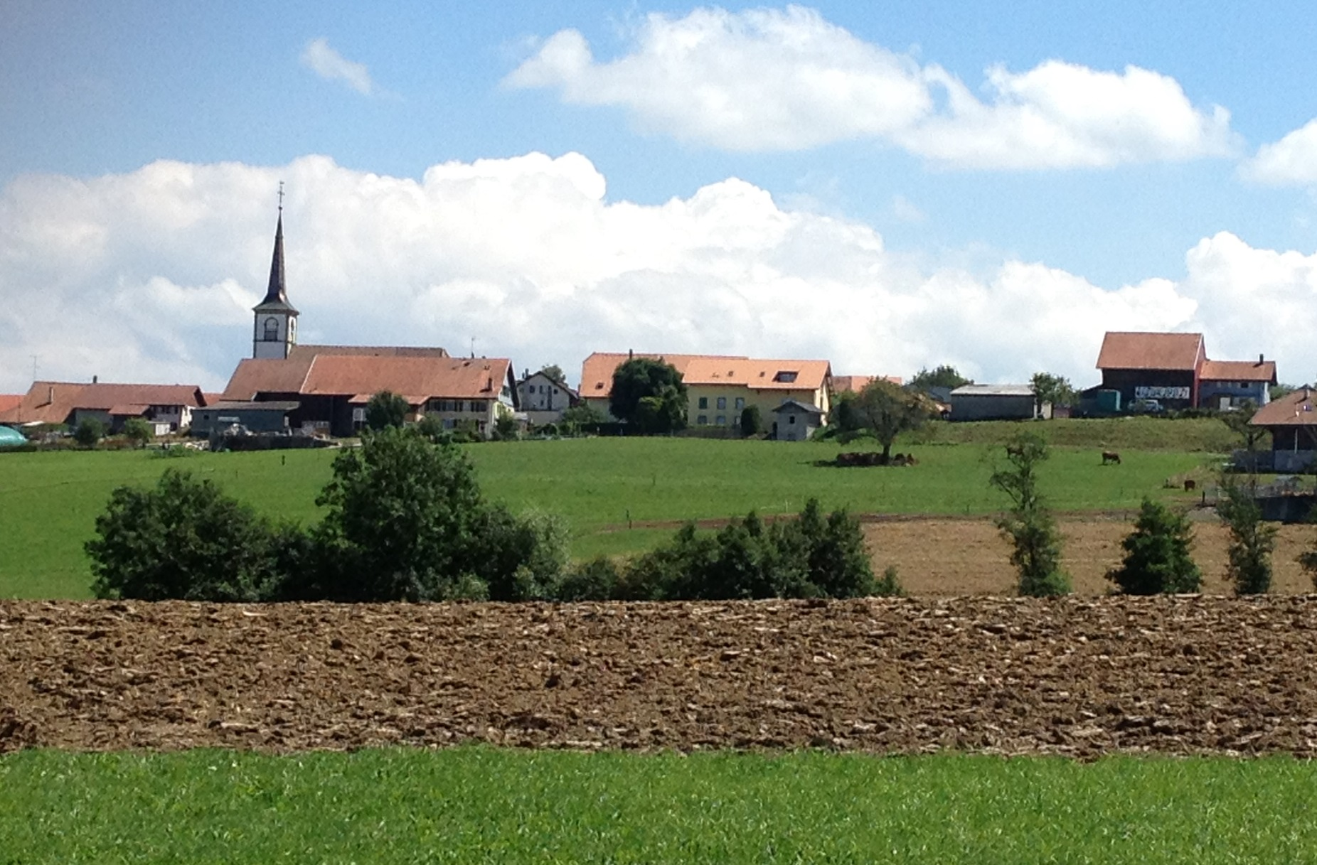 Le village de Villarimboud dans la commune fribourgeoise de La Folliaz en Suisse.